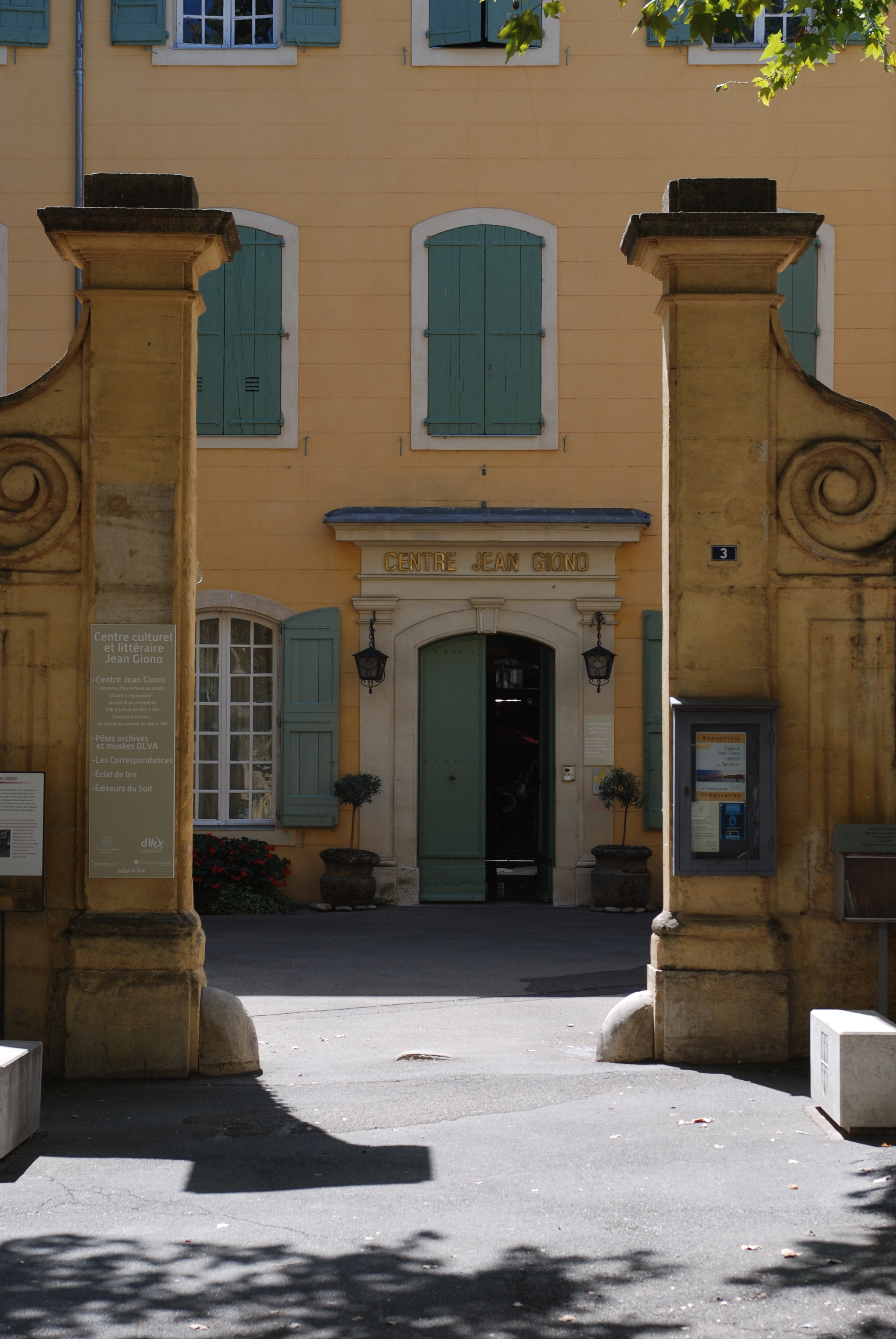 Eingang, Centre Jean Giono, Département Alpes-de-Haute-Provence, (France)